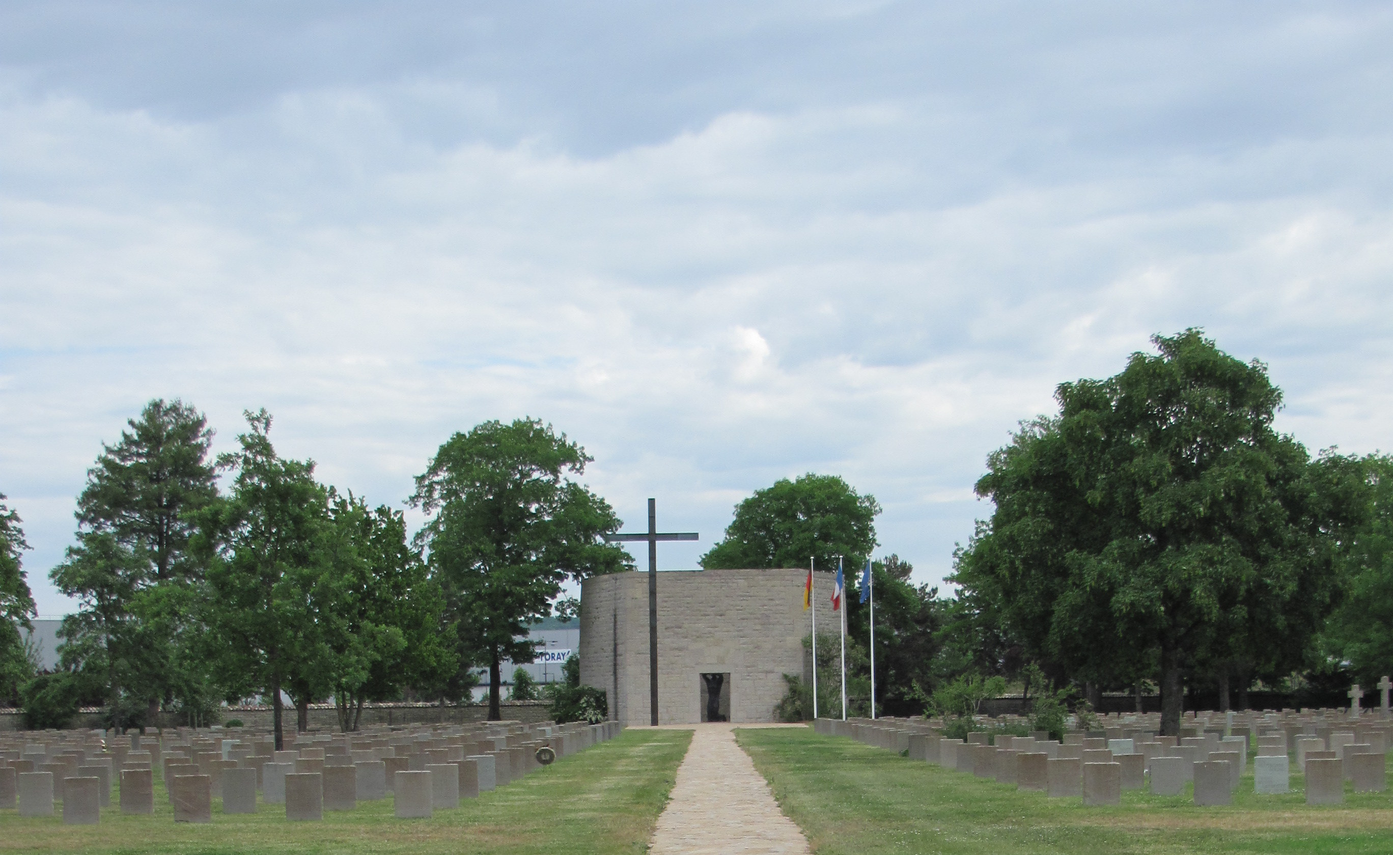 Cimetière militaire allemand de Dagneux dans l'Ain. Vue de l'ossuaire et du cimetière.